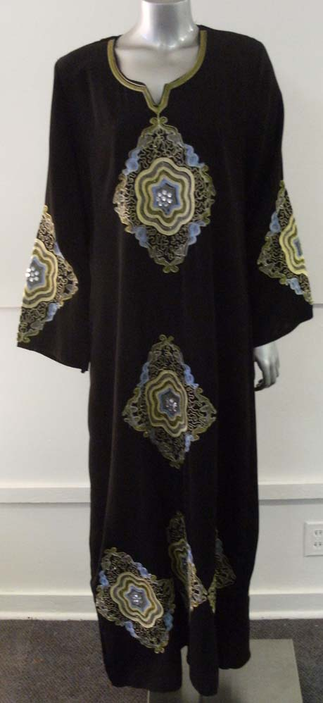 vestiti modesti per i musulmani e i non-musulmani